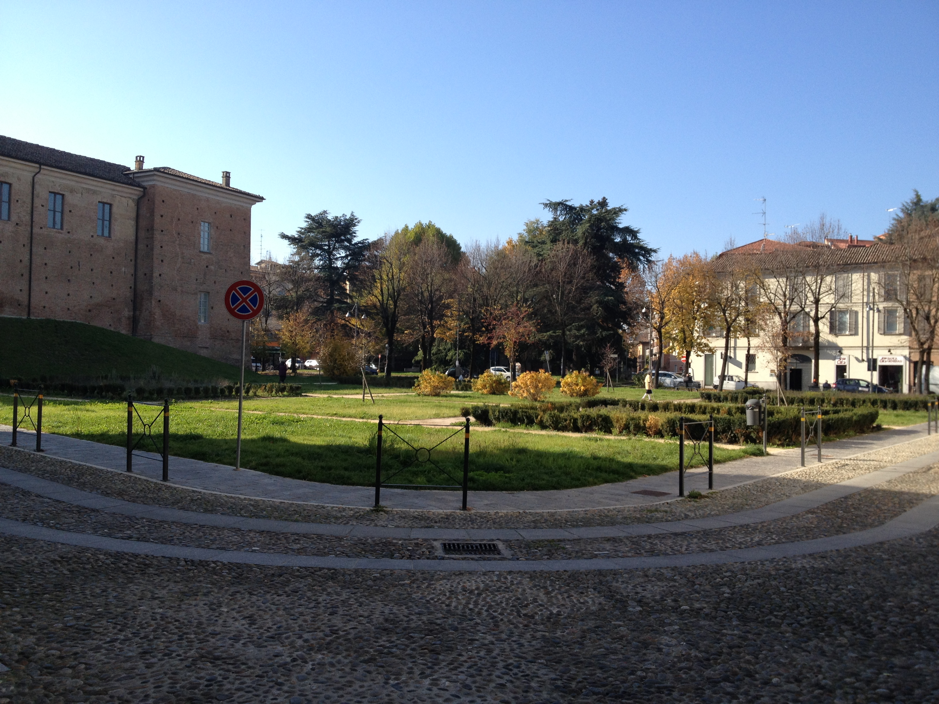 veduta di Piazza della Liberazione a Voghera (PV)